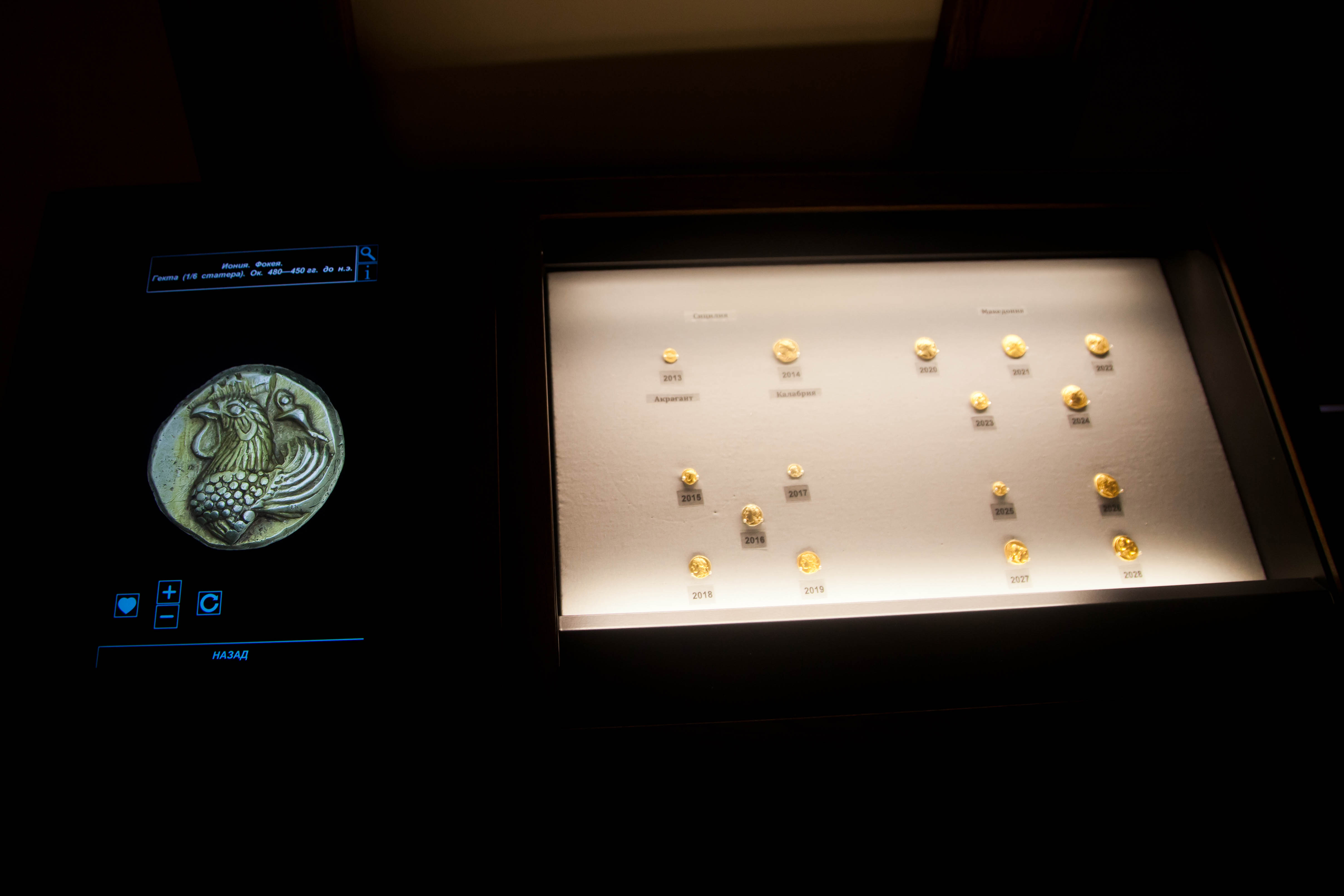 Музей Международного нумизматического клуба, Москва